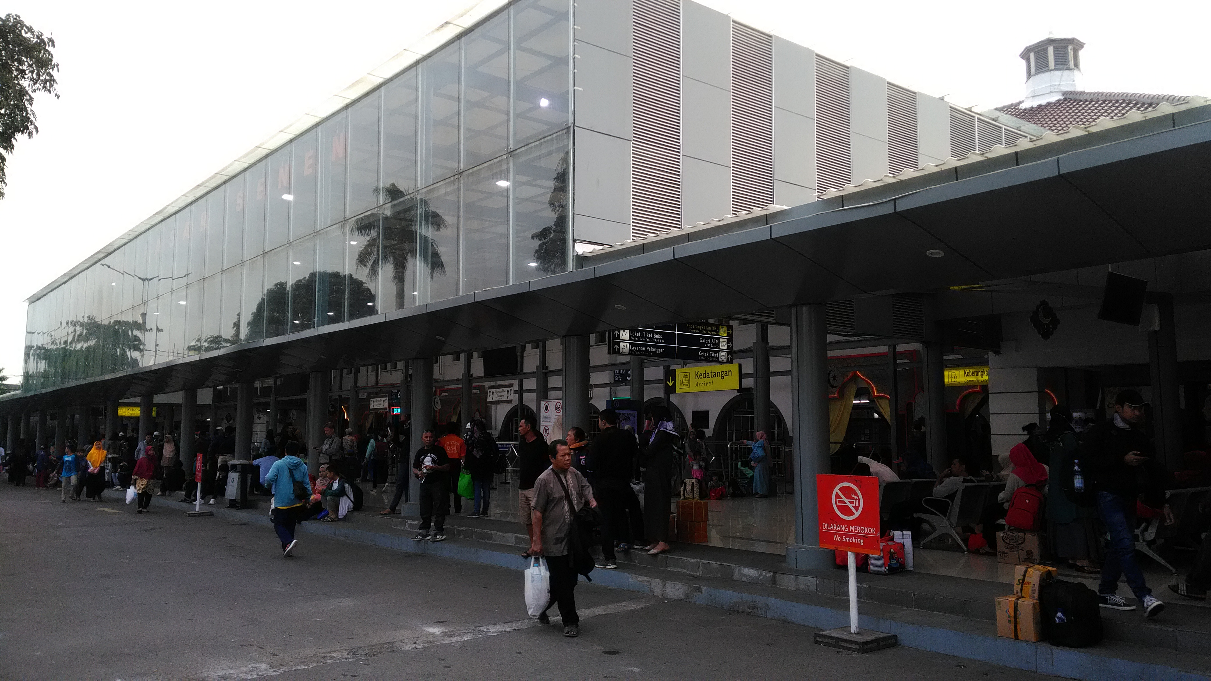 Suasana Stasiun Pasar Senen, 2019